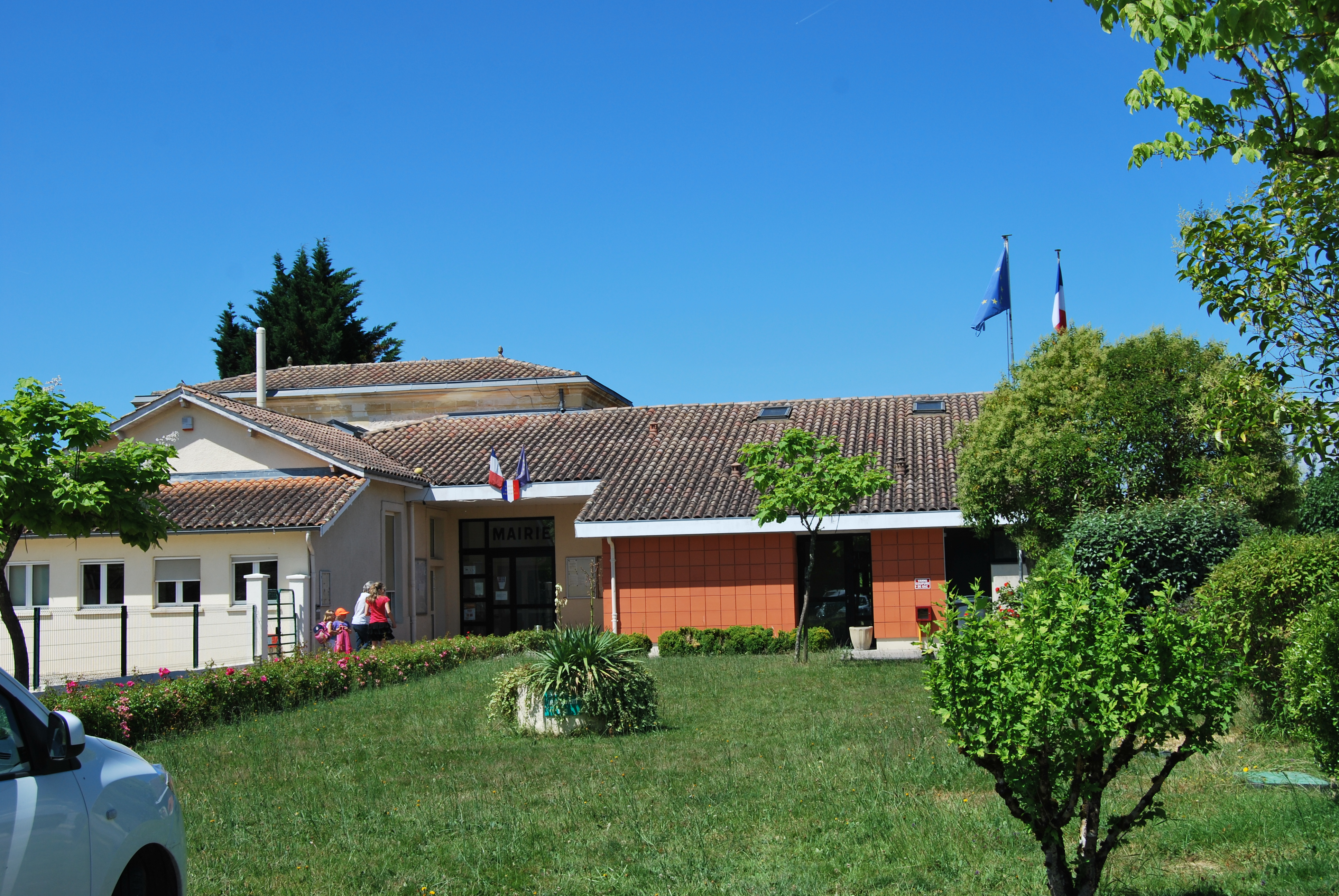 Madirac nouvelle mairie